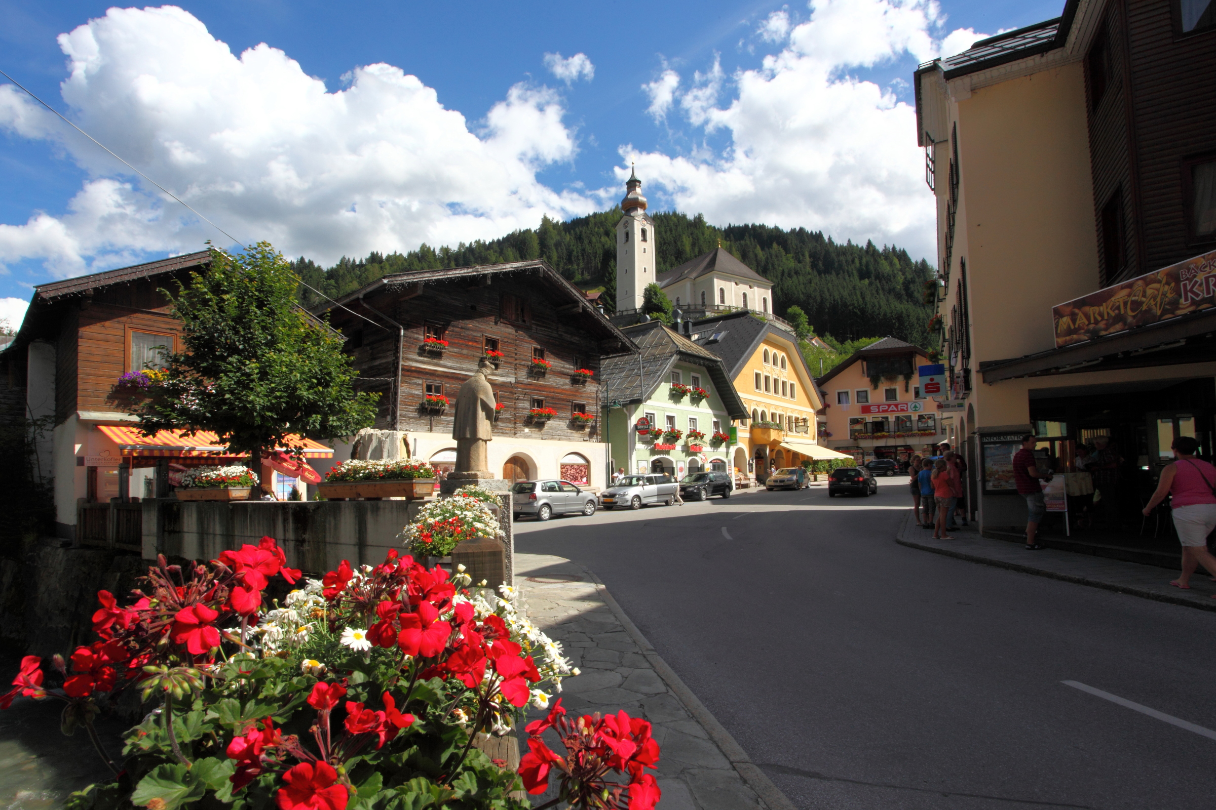 Über Großarl thront die Pfarrkirche Großarl